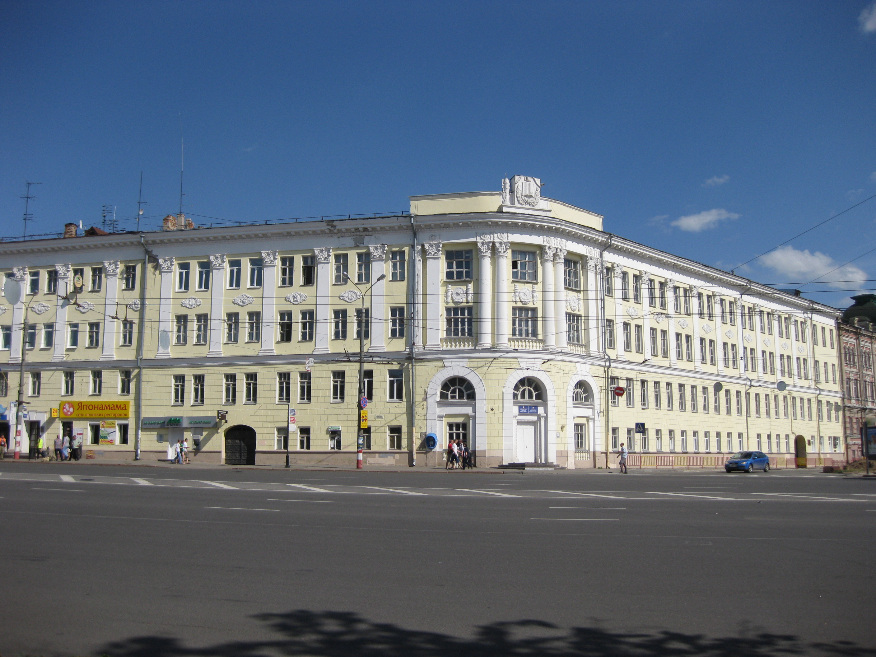 Гимназия № 1 на пл Минина и Пожарского, Нижний Новгород